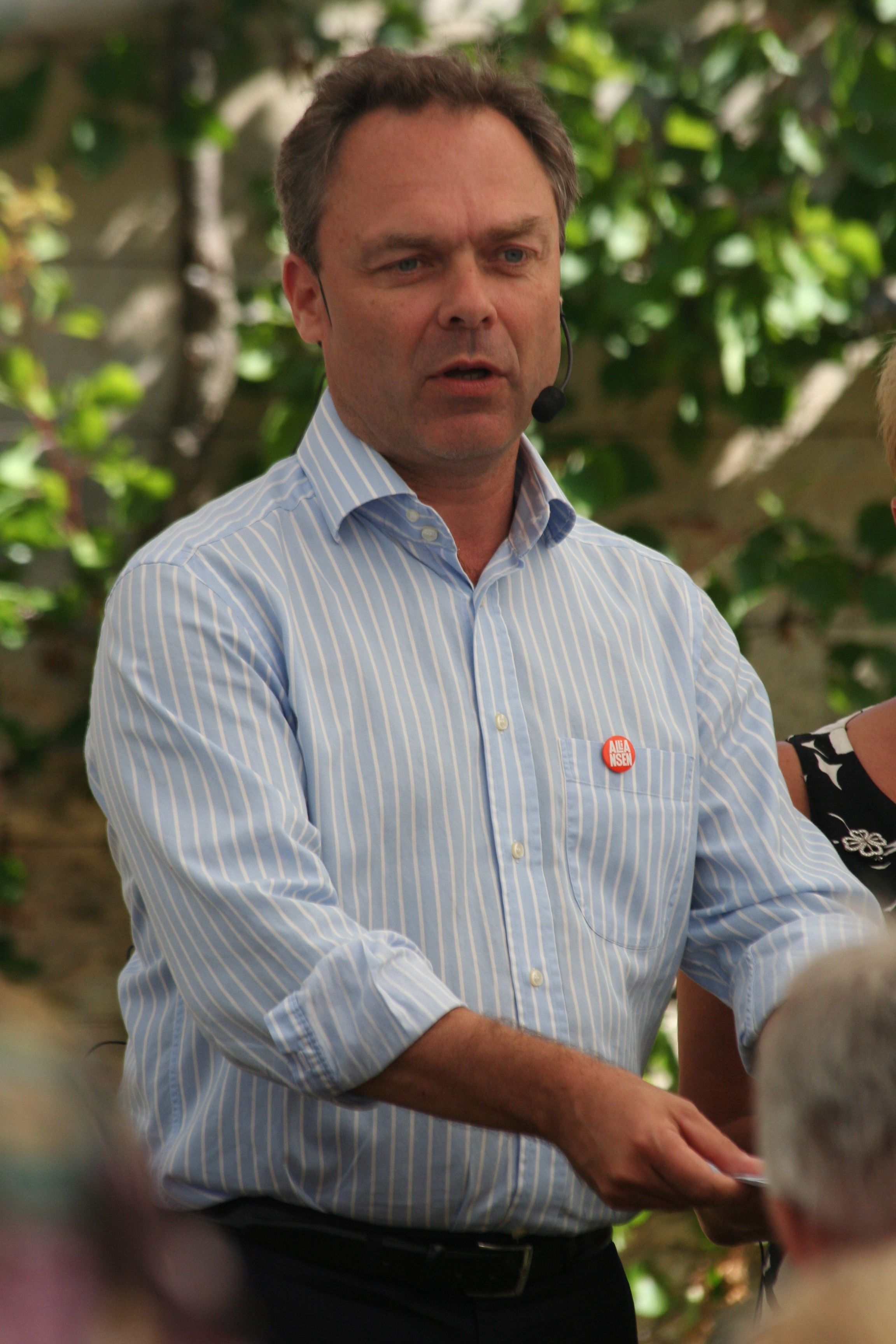 Foto: Niklas Carlsson